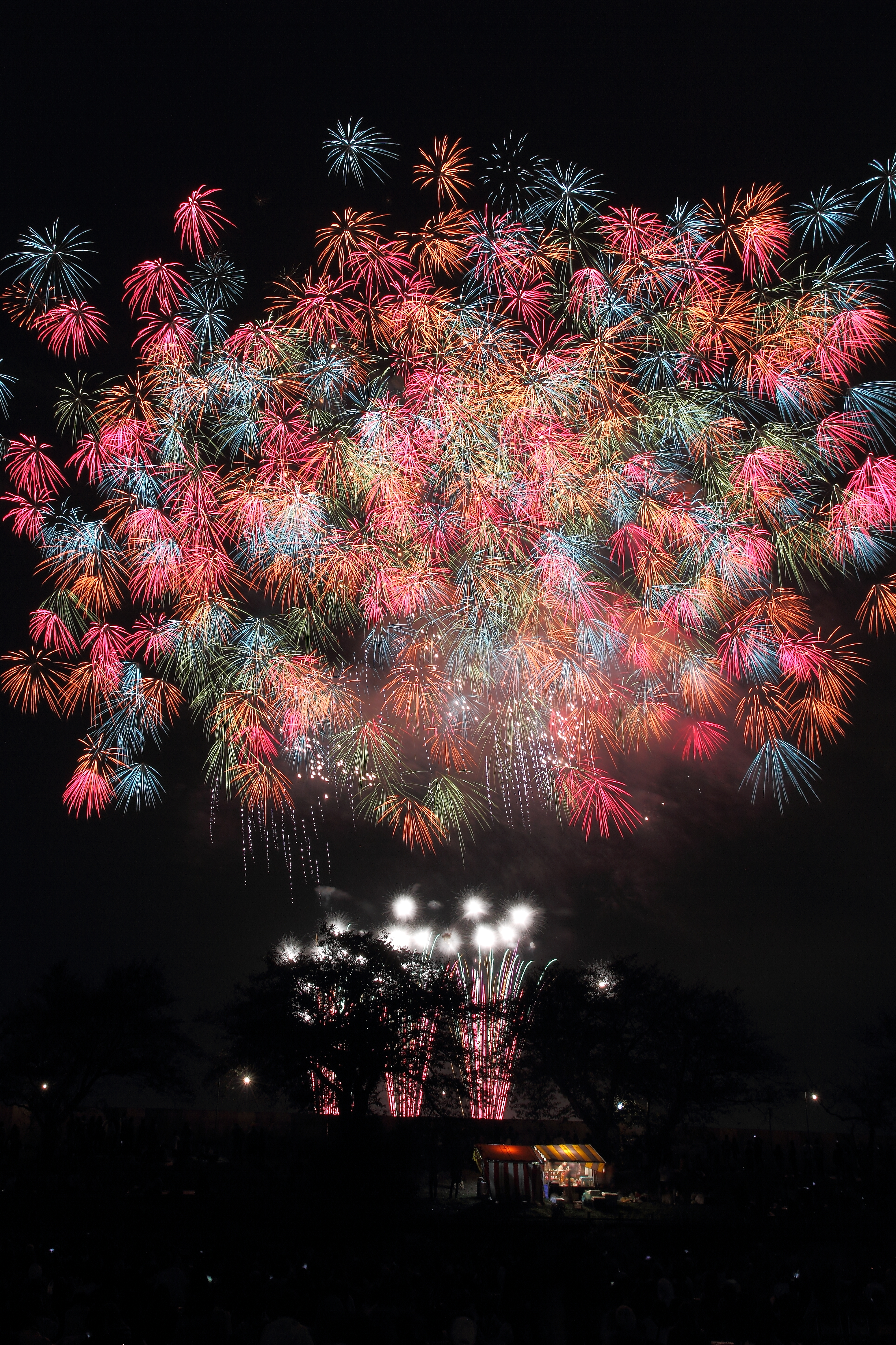 土浦全国花火競技大会 スターマインより